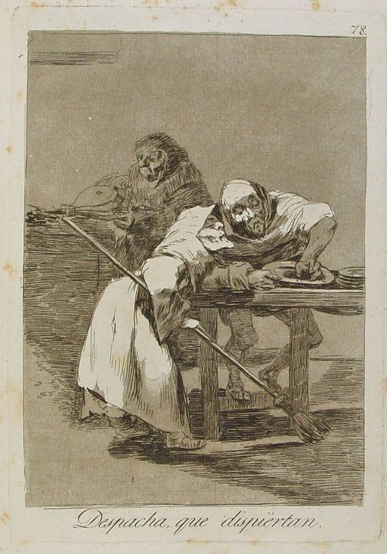 Capricho nº 78: Despacha, que despiertan de Goya, serie Los Caprichos